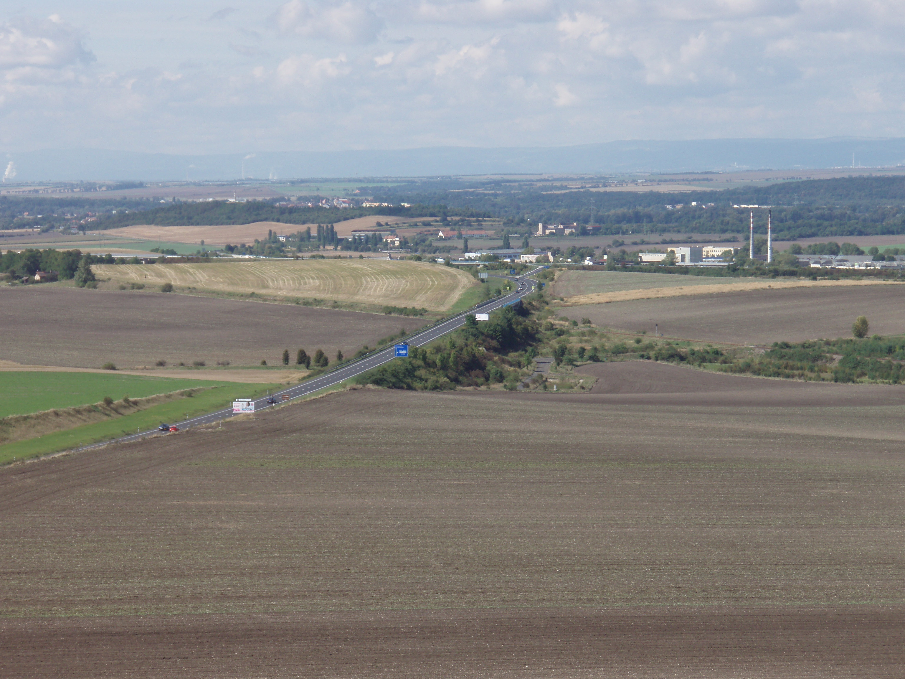 Pohled z vodárenské věže na západoseverozápad. V pozadí Krušné hory, vpravo areál firmy Elektroporcelán Louny, vlevo Březenský vrch a za ním schované Postoloprty. Skrz snímek vede obchvat Loun, silnice I/7.